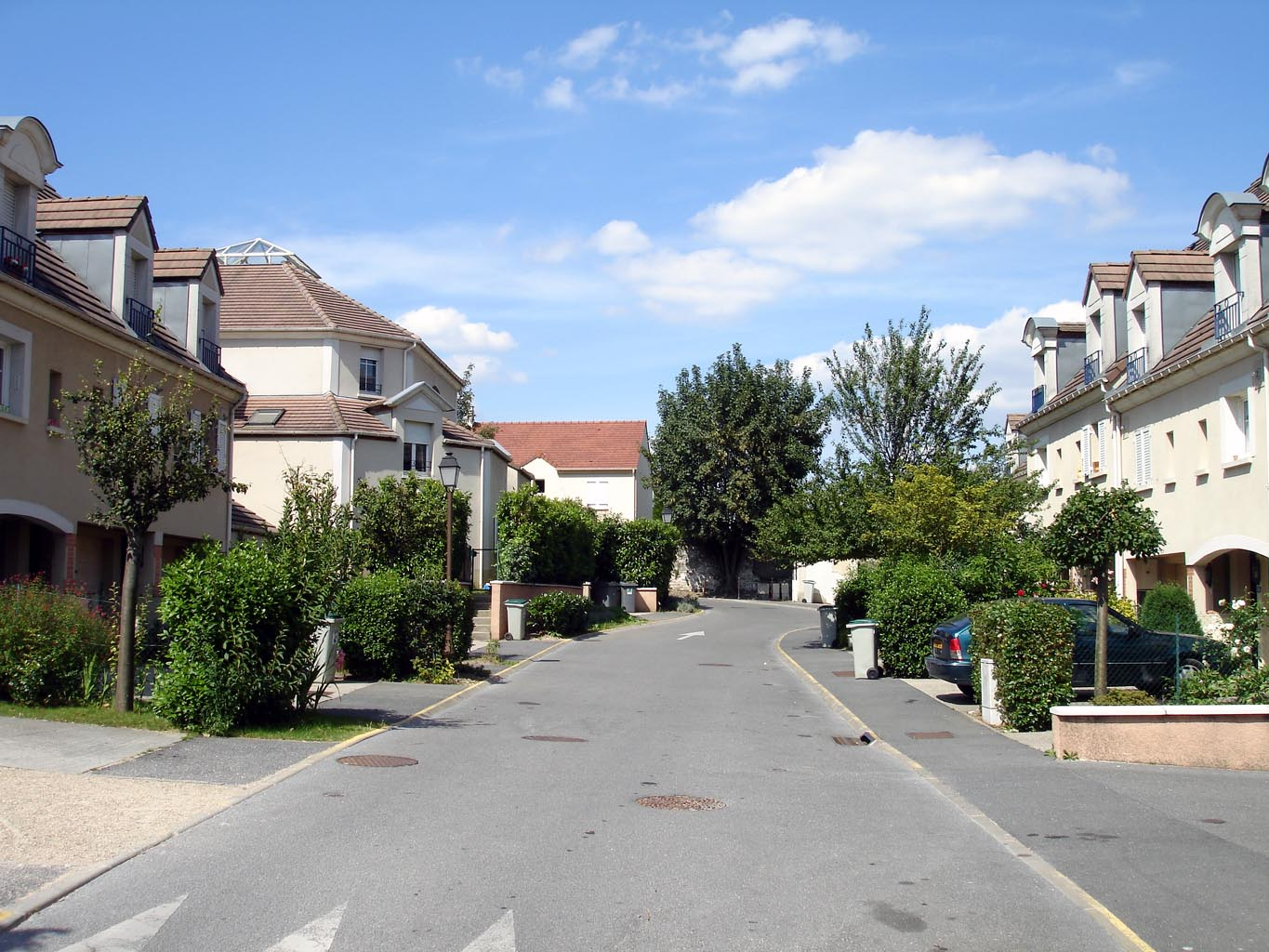 Le chemin des Tournelles à Roissy-en-France (Val-d'Oise), France